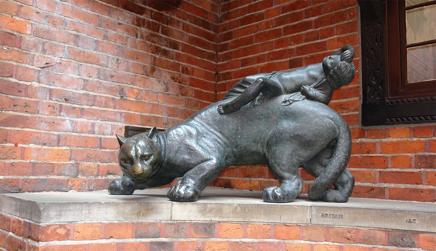 Bernhard Hoetger: Silberlöwe, den Tag tragend (1912, Bronze). Standort: Böttcherstraße Das abgebildete Objekt ist ein geschütztes Kulturdenkmal in der Freien Hansestadt Bremen, mit der Nr. 1497,T001 beim Landesamt für Denkmalpflege registriert.